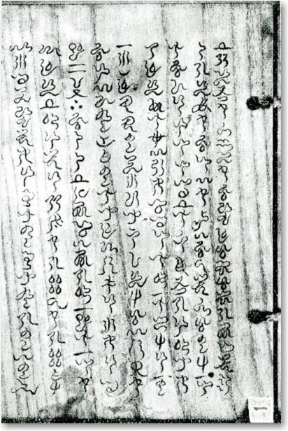 桐板に、古代文字（阿比留草文字）で書かれた大御食神社の社伝記